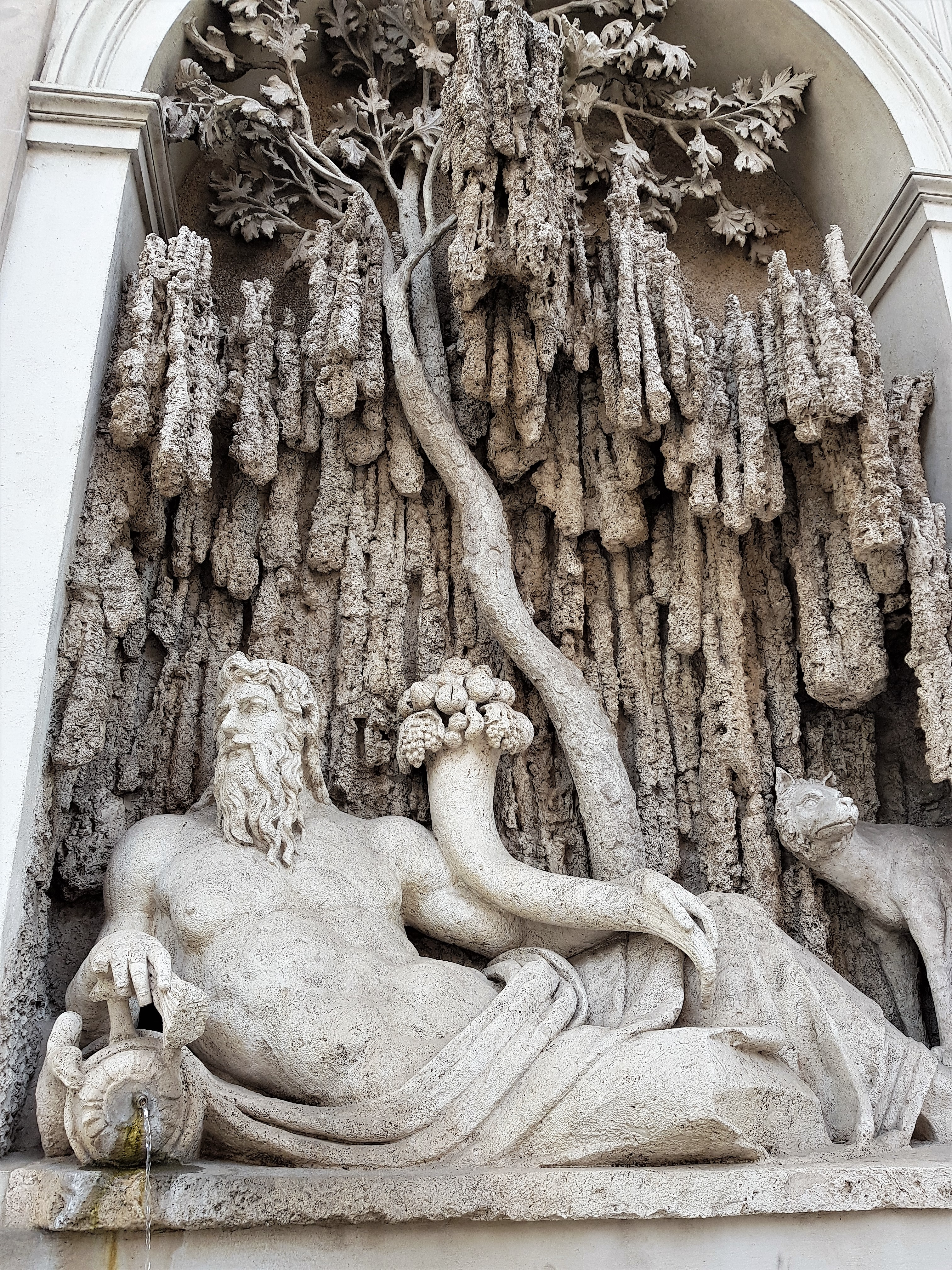 Roma, Quattro Fontane: il Tevere, una delle quattro fontane.